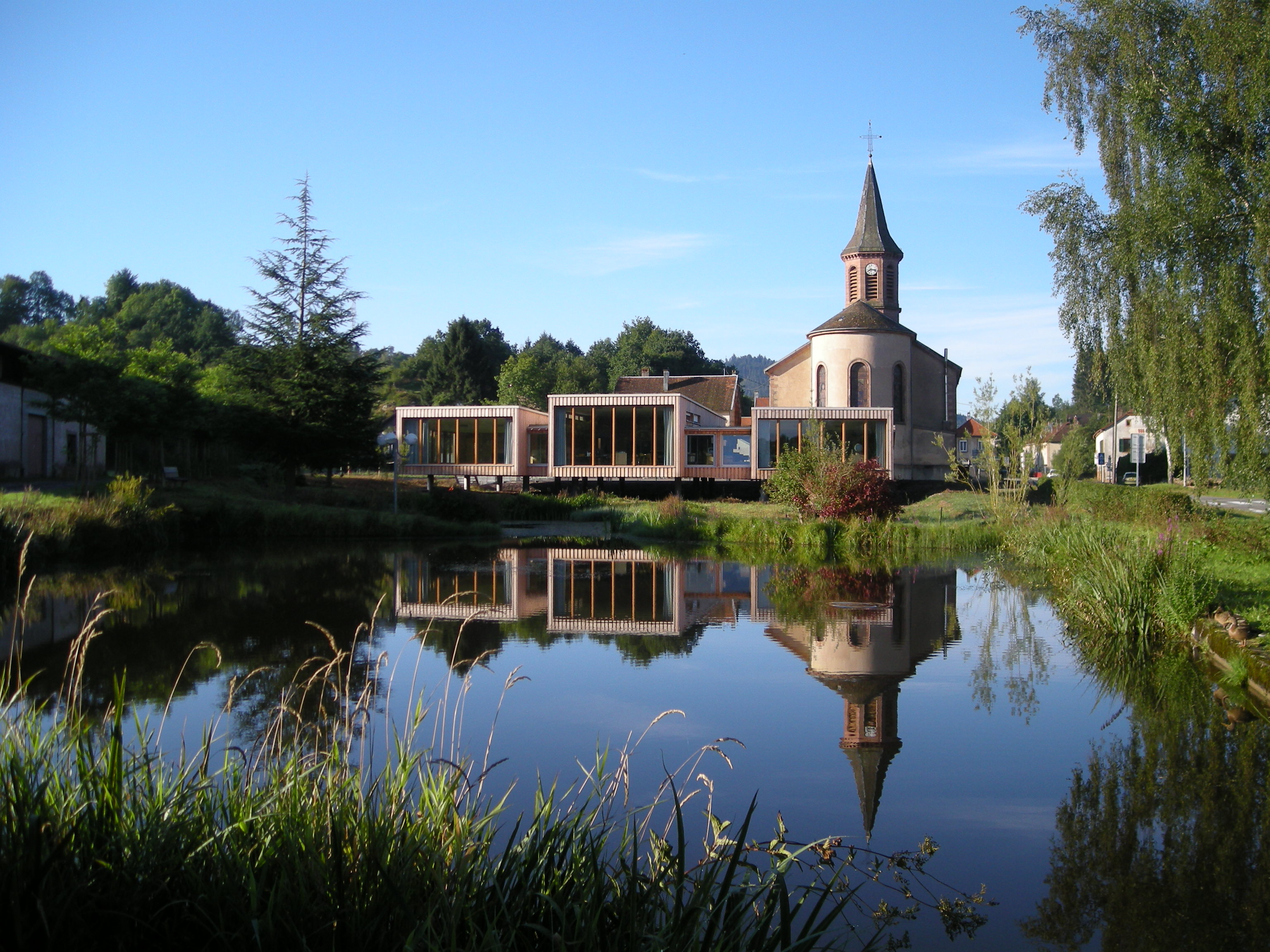 L'église et la nouvelle école en bois de Bourg-Bruche (Bas-Rhin, France)